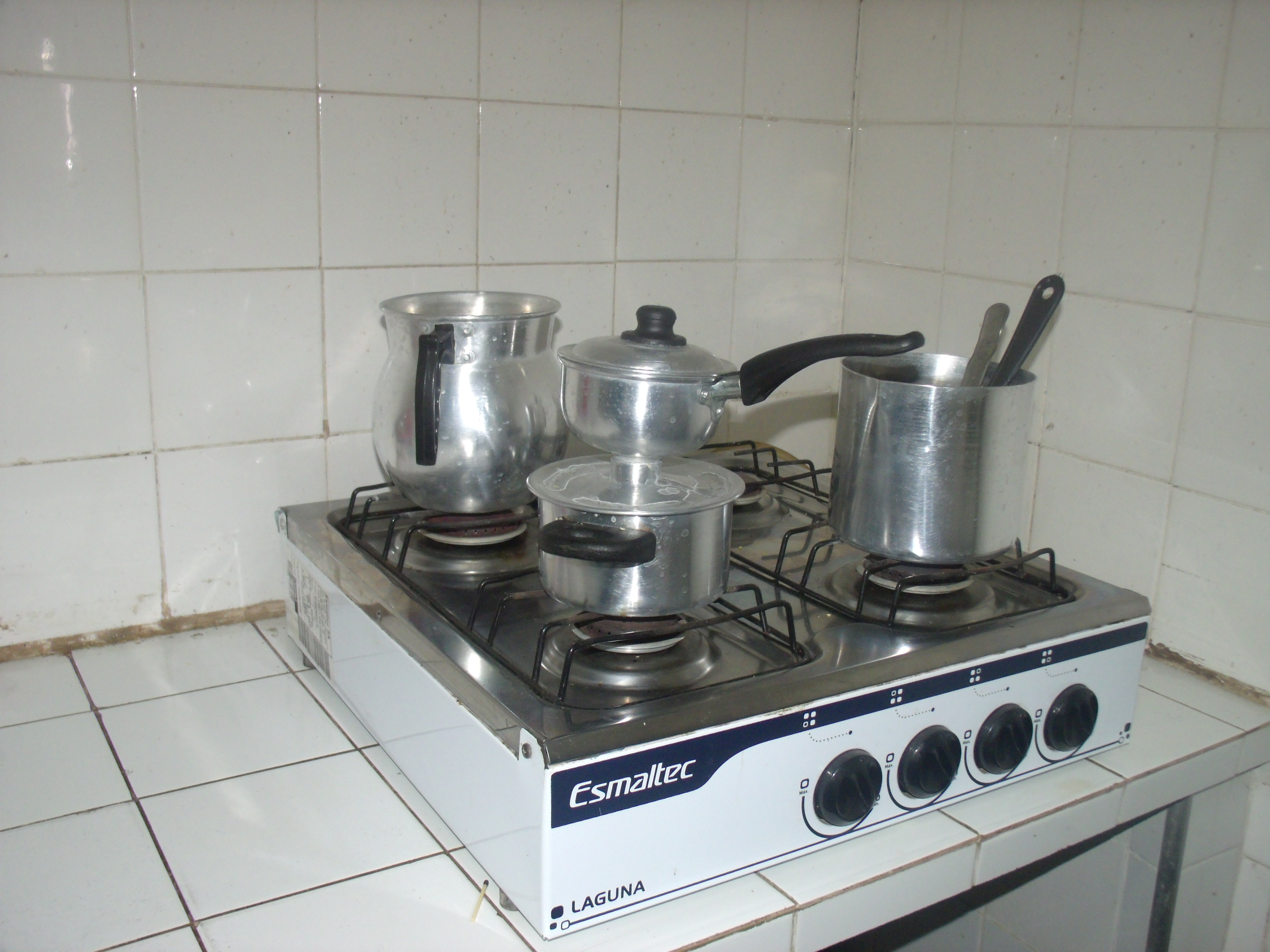 Fogão de mesa cheio de panelas numa cantina de órgão.